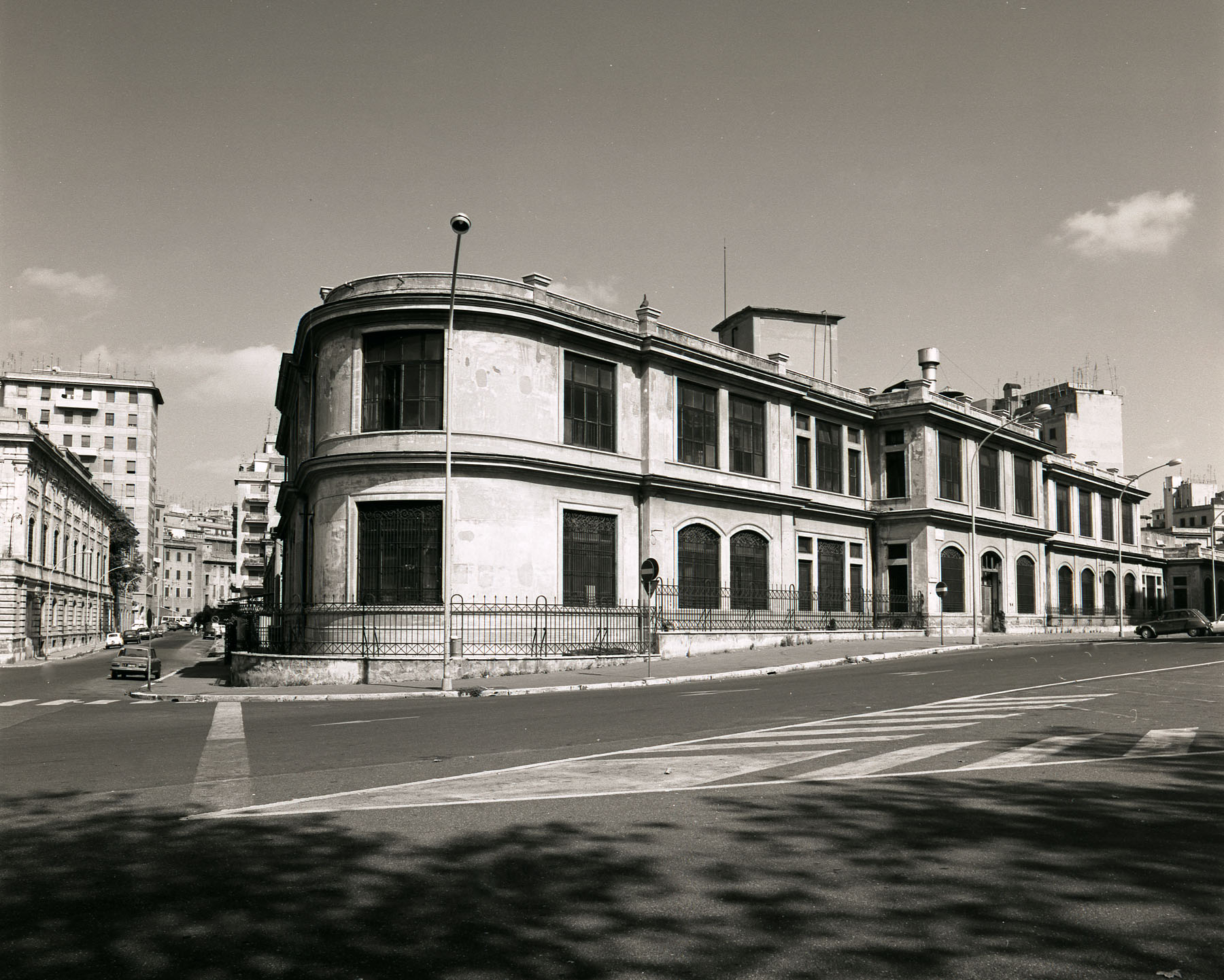 Il Poligrafico dello Stato di via C. Baronio Roma